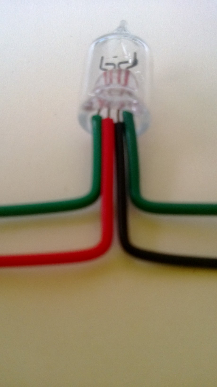 Das Bild zeigt einen Thermoumformer. Der zu messende Strom fließt durch durch den grünen Draht und erhitzt im inneren eine Heizwendel. Ein direkt an diese Heizwendel angebrachtes Temperaturelement erzeugt eine der Wärme porportionale Spannung zwischen den Anschlüssen rot (positiv) und schwarz (negativ).